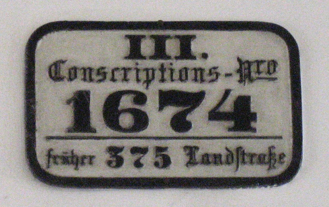 Wien Hausschild Ungargasse 27